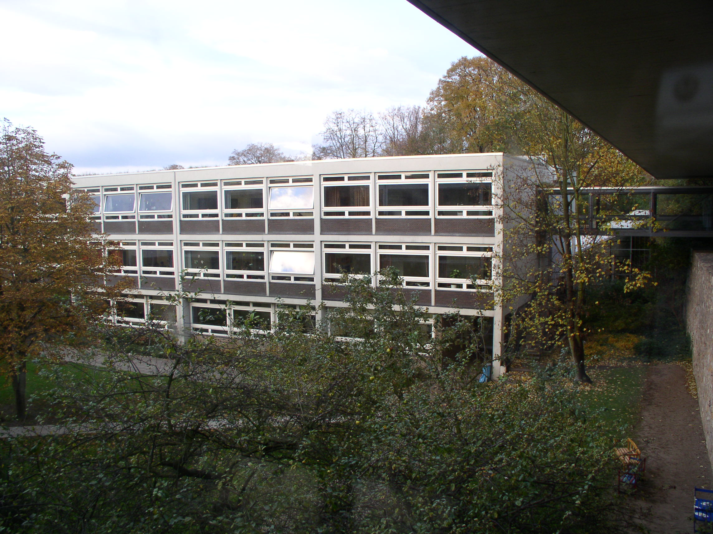 Westtrakt des Gymnasium Andreanum, vom Hauptgebäude aus fotografiert